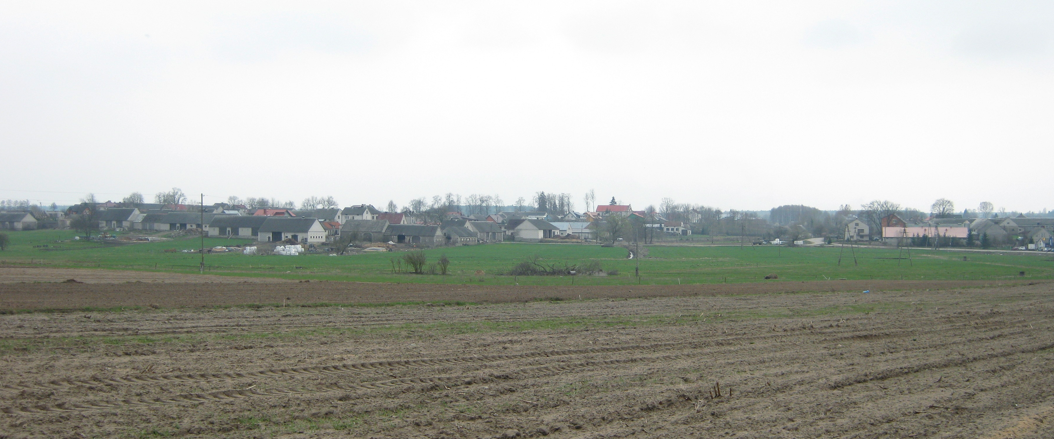 wieś Poryte - powiat kolneński